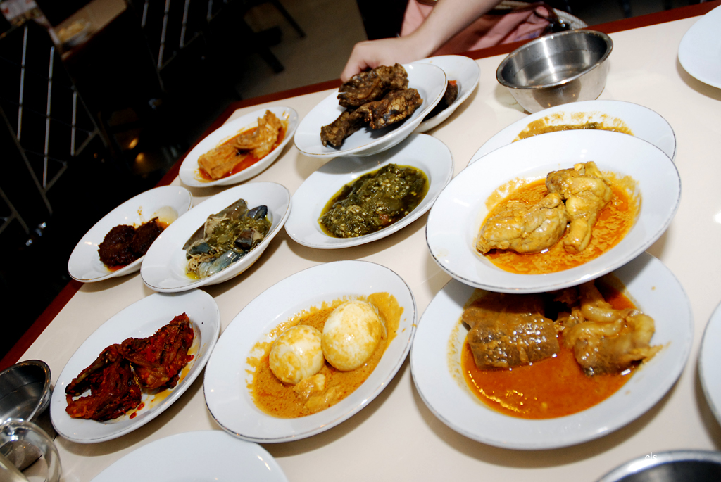 Makanan Padang di restoran Simpang Raya